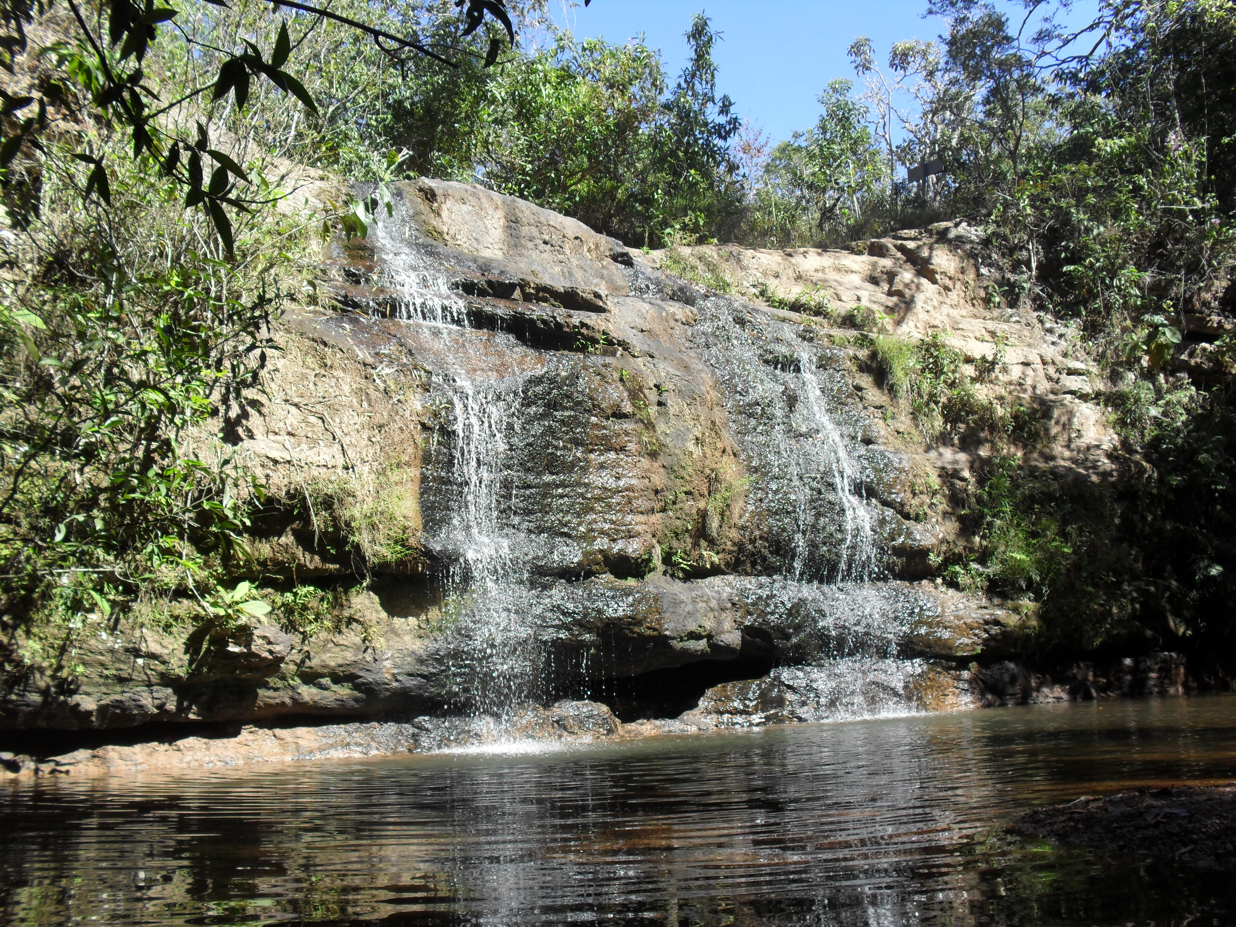 Da mesma maneira que percebemos o ir além, o ultrapassar de todos os limites,verificamos o quanto é difícil e impreciso articular uma nomenclatura para a produção de uma memória, conseguir captar o que existe atrás do que se vê com os olhos.